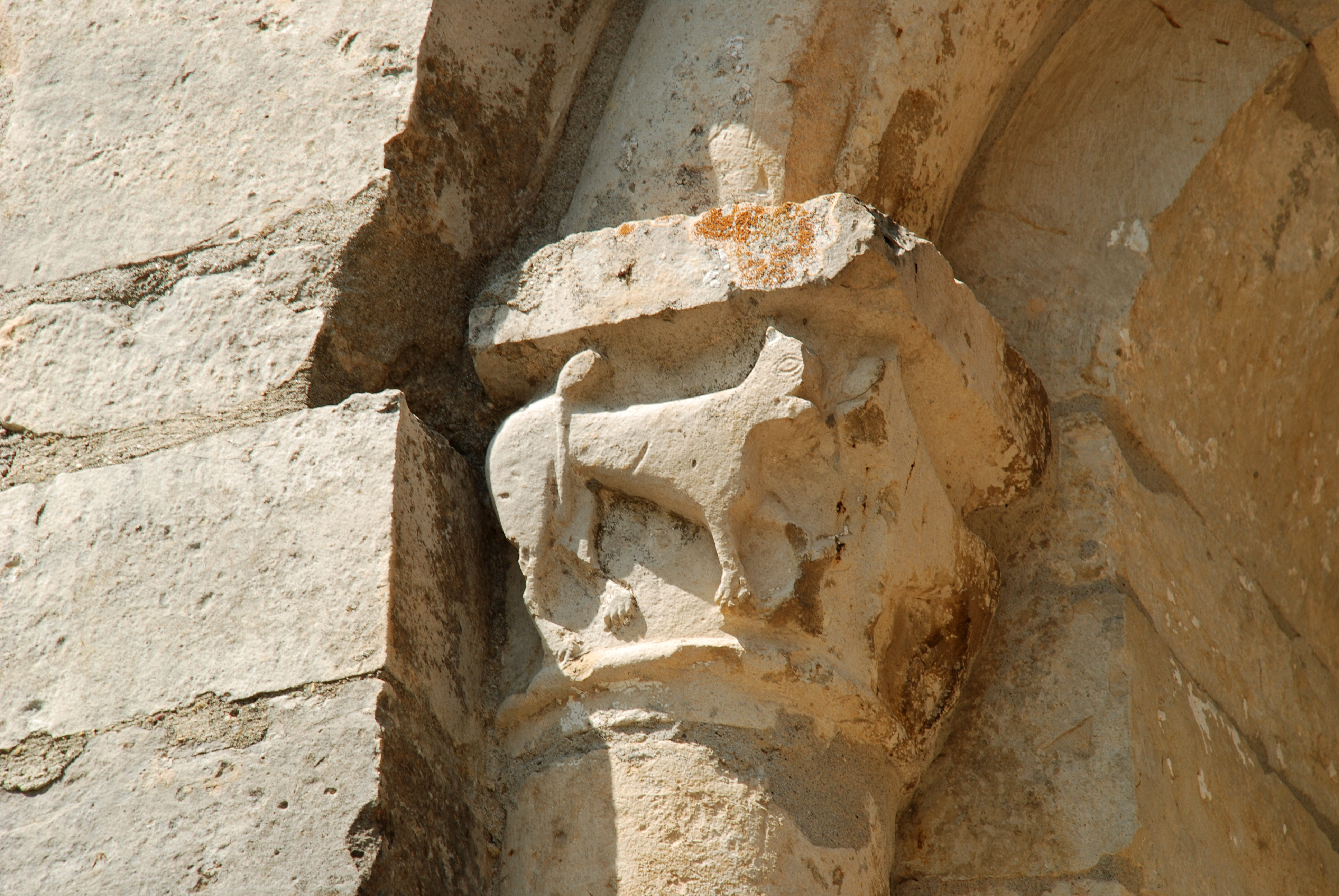 France - Hérault - Église Saint-Michel de Guzargues